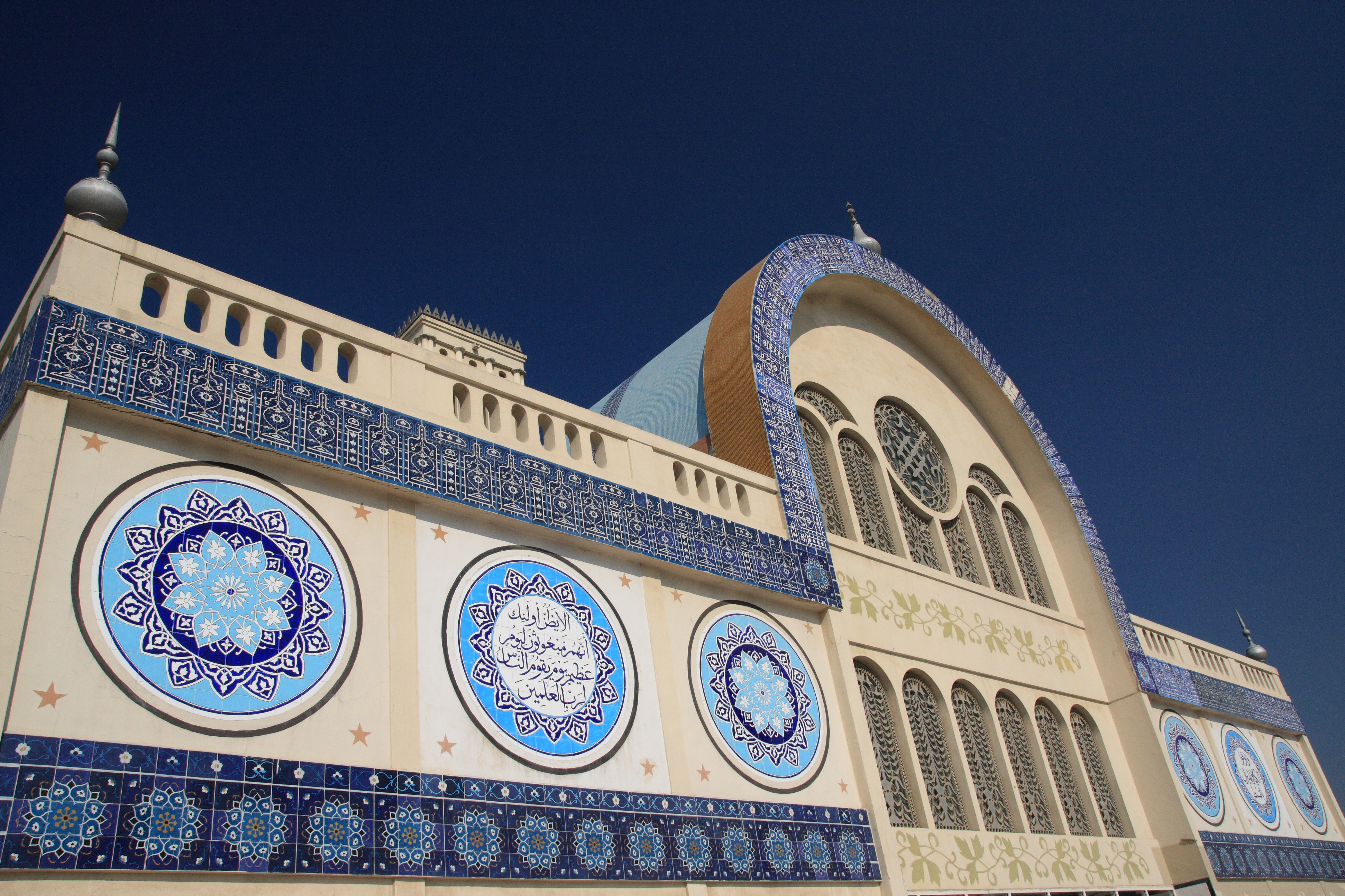 Blue Souk, Sharjah, UAE